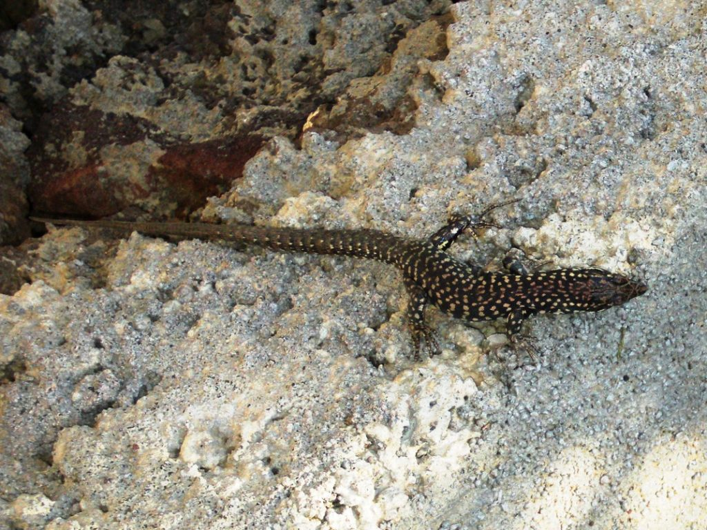 Podarcis filfolensis subsp. laurentiimuelleri (Fejervary, 1924)Linosa